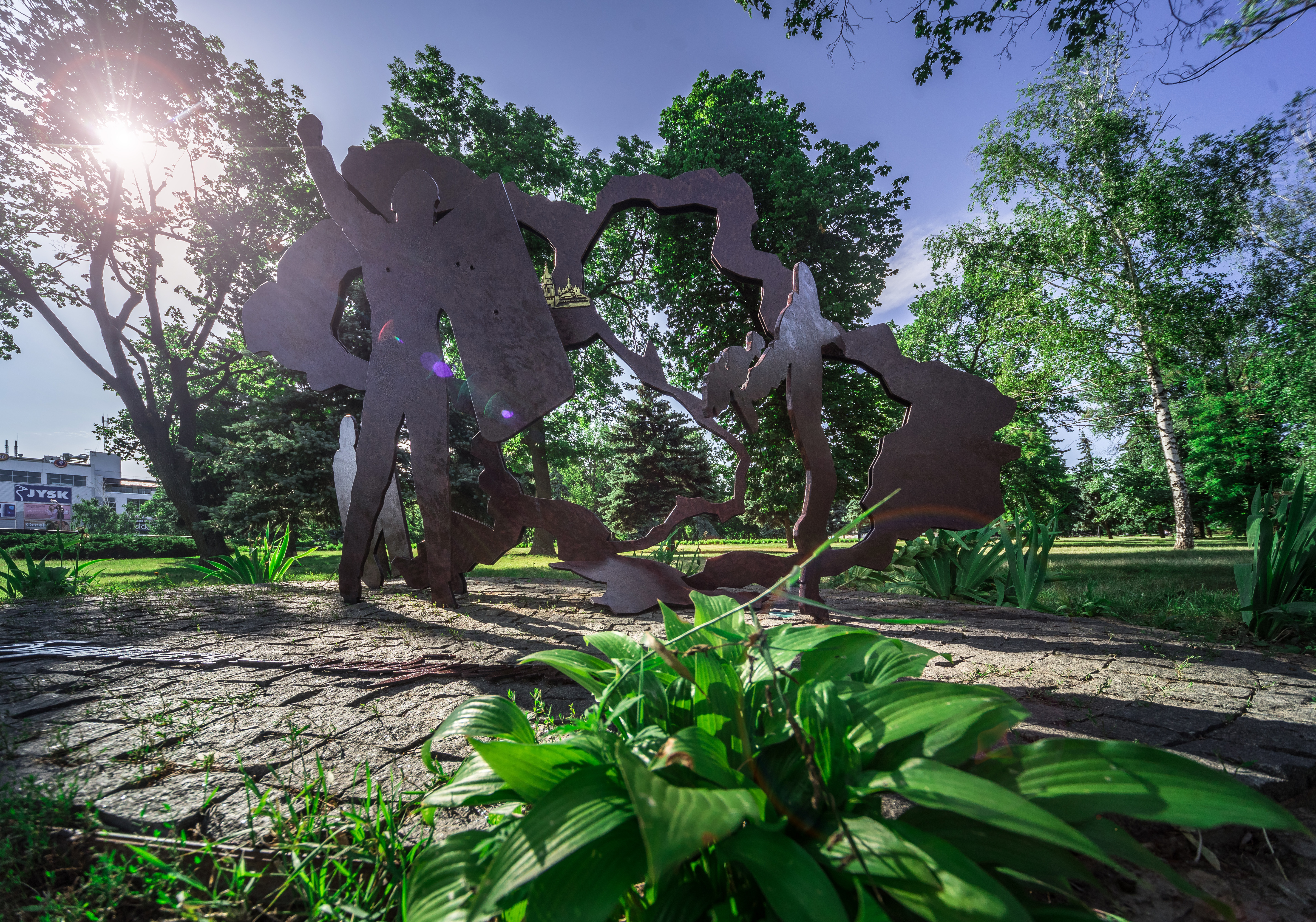 Пам’ятник Героям Небесної Сотні був встановлений у 2016 році на території парку Слави в місті Біла Церква. Автором роботи став білоцерківський скульптор Олександр Виговський, котрий був активним учасником революції Гідності.